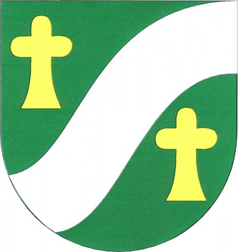 znak, Dobšice, okres Znojmo